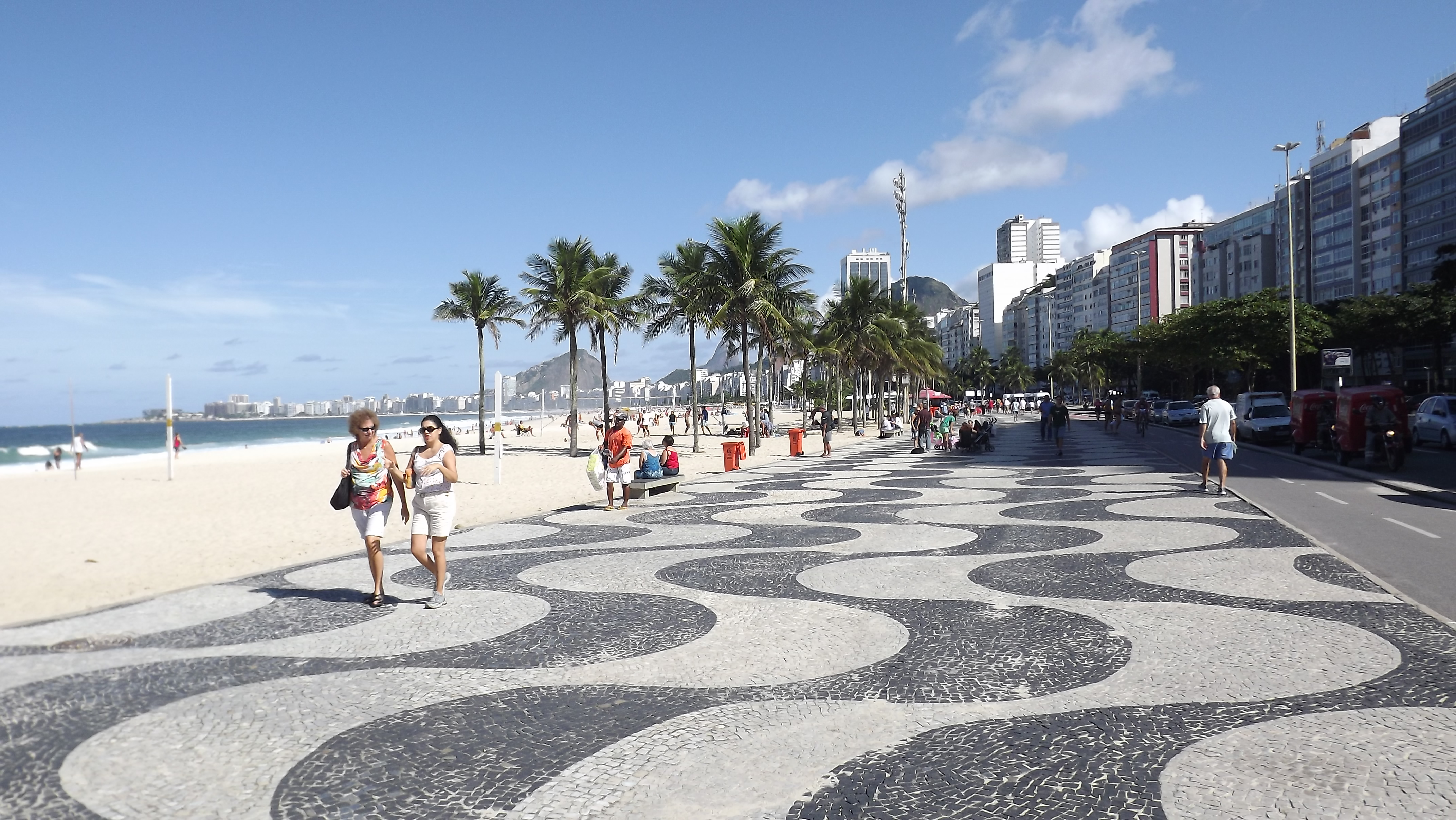 Um dos cartões postais do Rio de Janeiro: o calçadão da praia de Copacabana. Rio de Janeiro, Brasil.